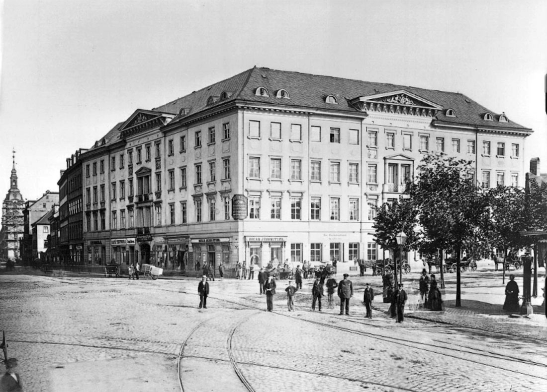 Grimmaischer Steinweg 2/Augustusplatz 2 in Leipzig, mit Papierhandlung Flinsch und Lithographische Anstalt Karl Fürstenau (Teubners Haus). Augustusplatz vorn, im Hintergrund zu sehen der Turm der Johanniskirche. Teubners Haus Augustusplatz 2 wurde 1880 durch einen Neubau für F. Flinsch ersetzt.